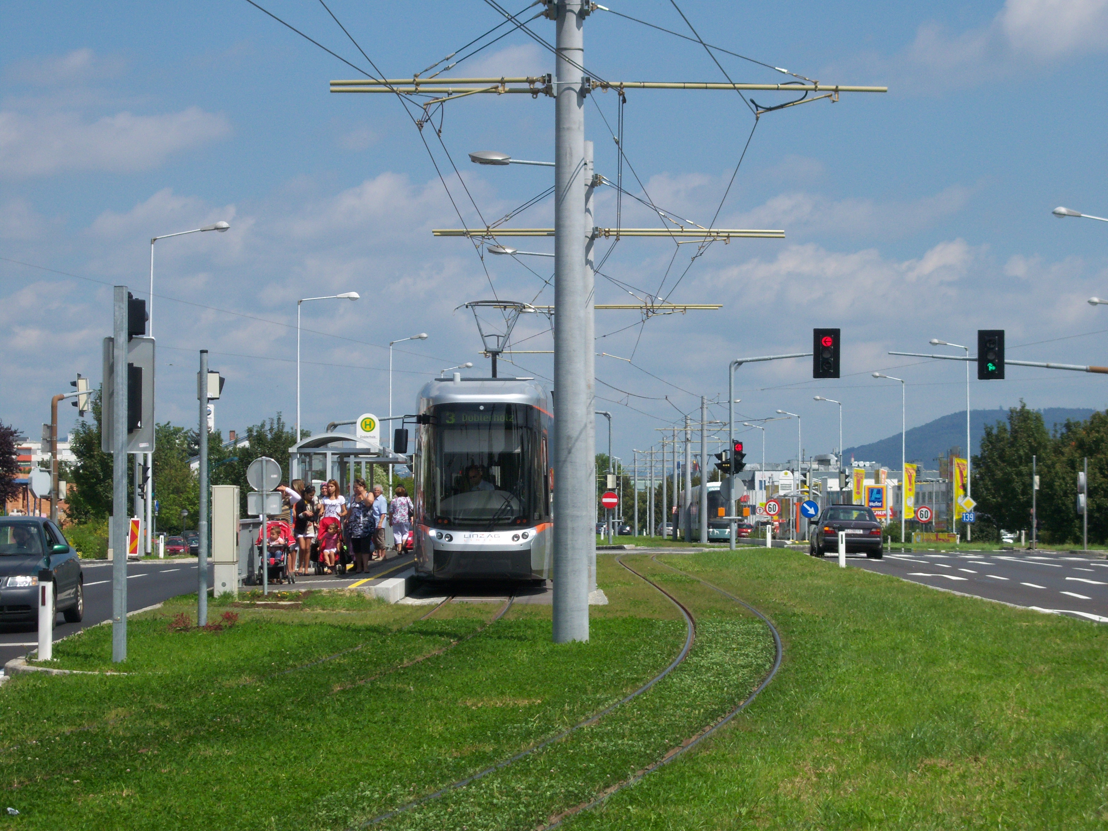 Straßenbahnlinie 3 (Linz–Leonding) in ihrer stadtauswärtigen Endstelle Doblerholz